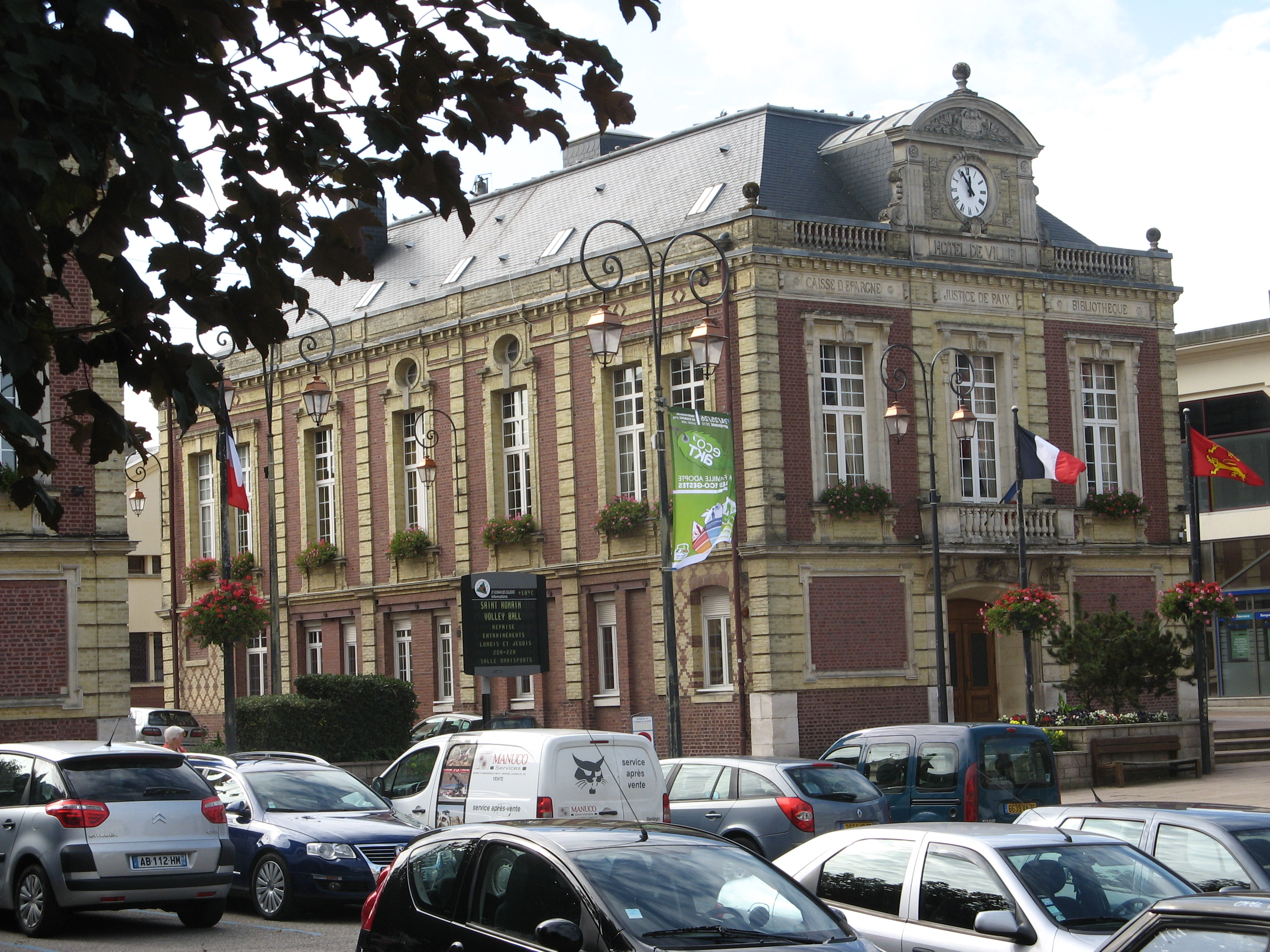 Place Th. Benoist, Saint-Romain de Colbosc, France